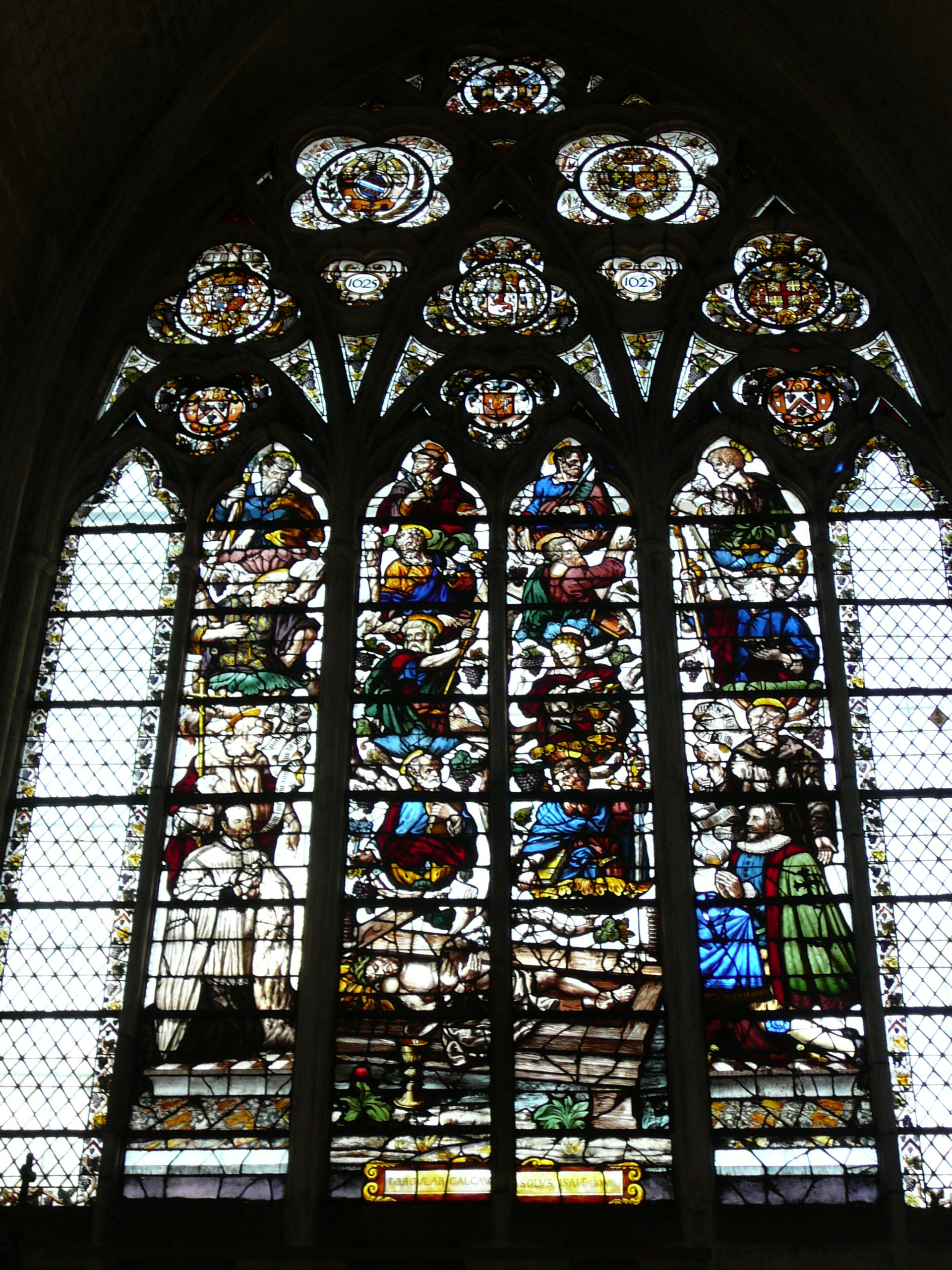 Vitrail du pressoir mystiqueImage